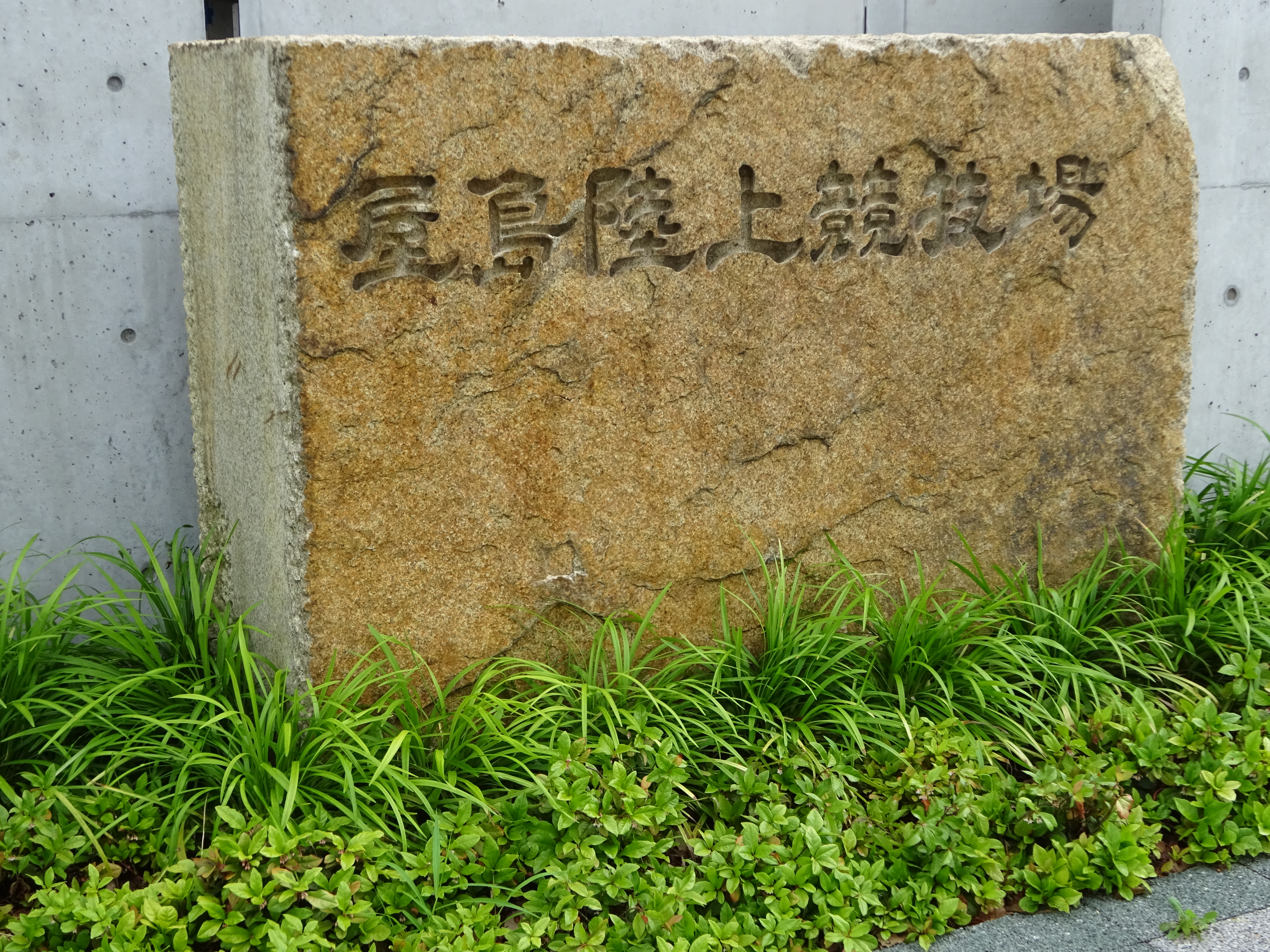 正面出入り口の南側歩道沿いに保存の「屋島陸上競技場」石造銘板